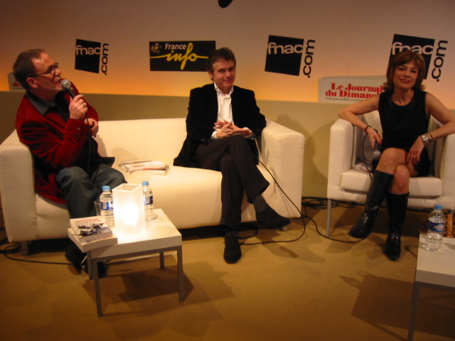 Claude Sérillon (au centre) au Salon du Livre Porte de Versaille à Paris